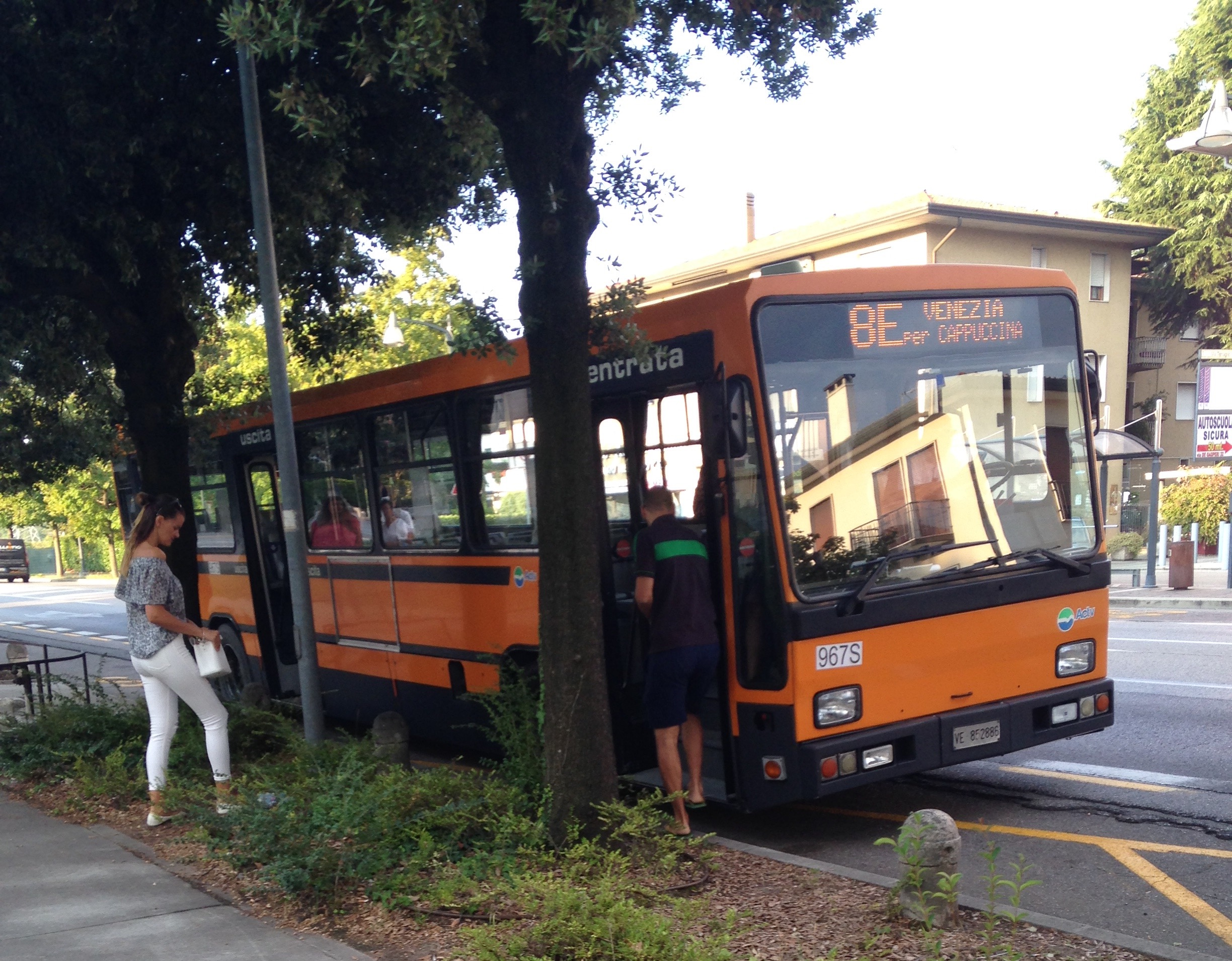 Bredabus 3001 matricola ACTV nr.967S in partenza dal capolinea mercatale di Preganziol - via Terraglio (fronte Municipio).